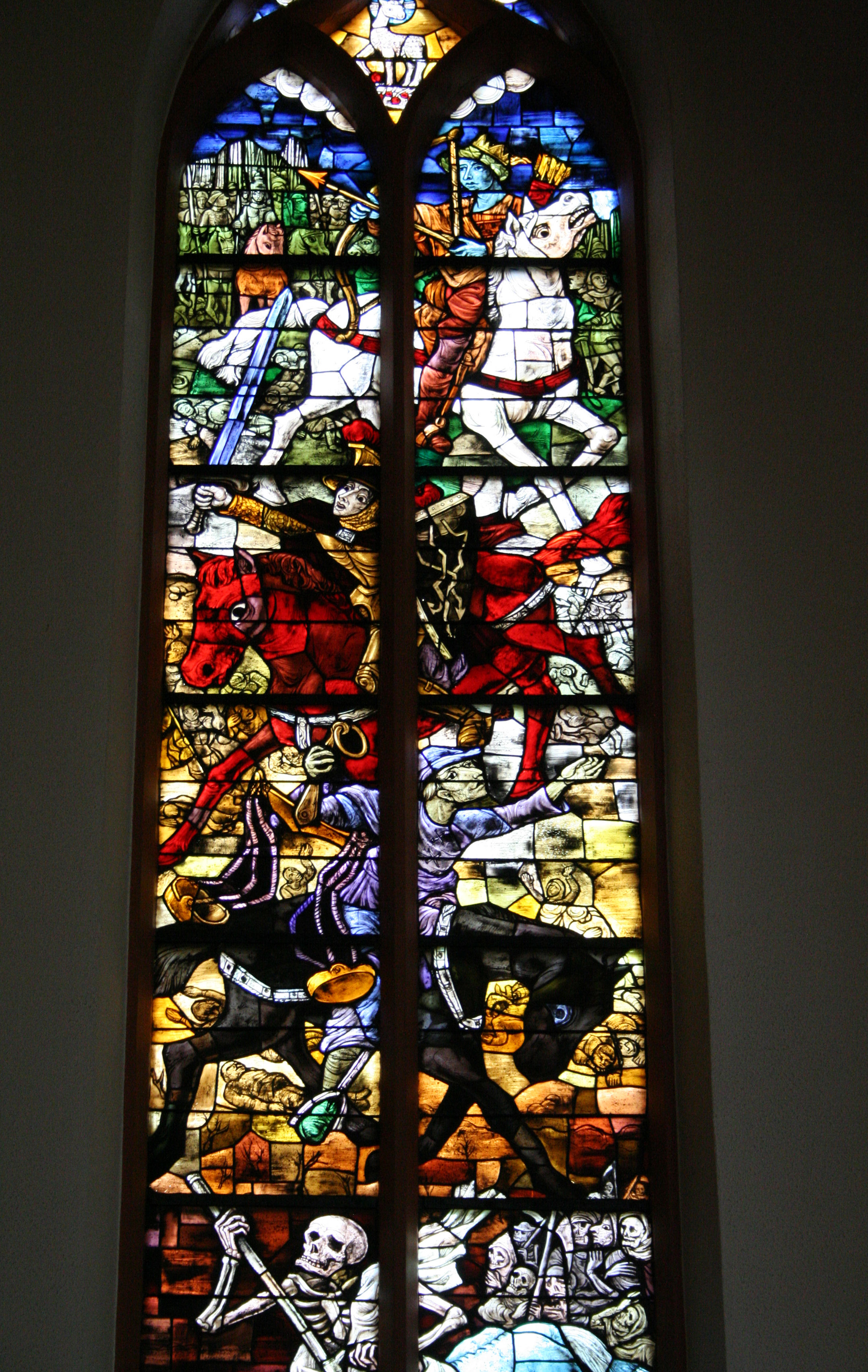 Gebrandschilderd Nicolas-raam in de RK-kerk te Tubbergen